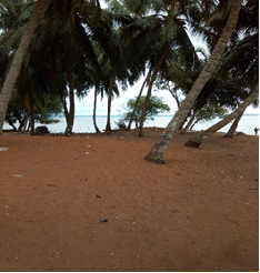 Les berges du lac Ahémé sont des espaces publics au bord du lac. S’est espaces constitue un lieu de distraction et de réjouissance pour les riverains de ces villages.